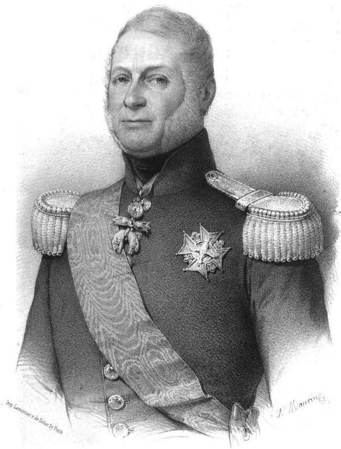 "Le Fils de Louis XVI. Ex-Baron de Richemont"